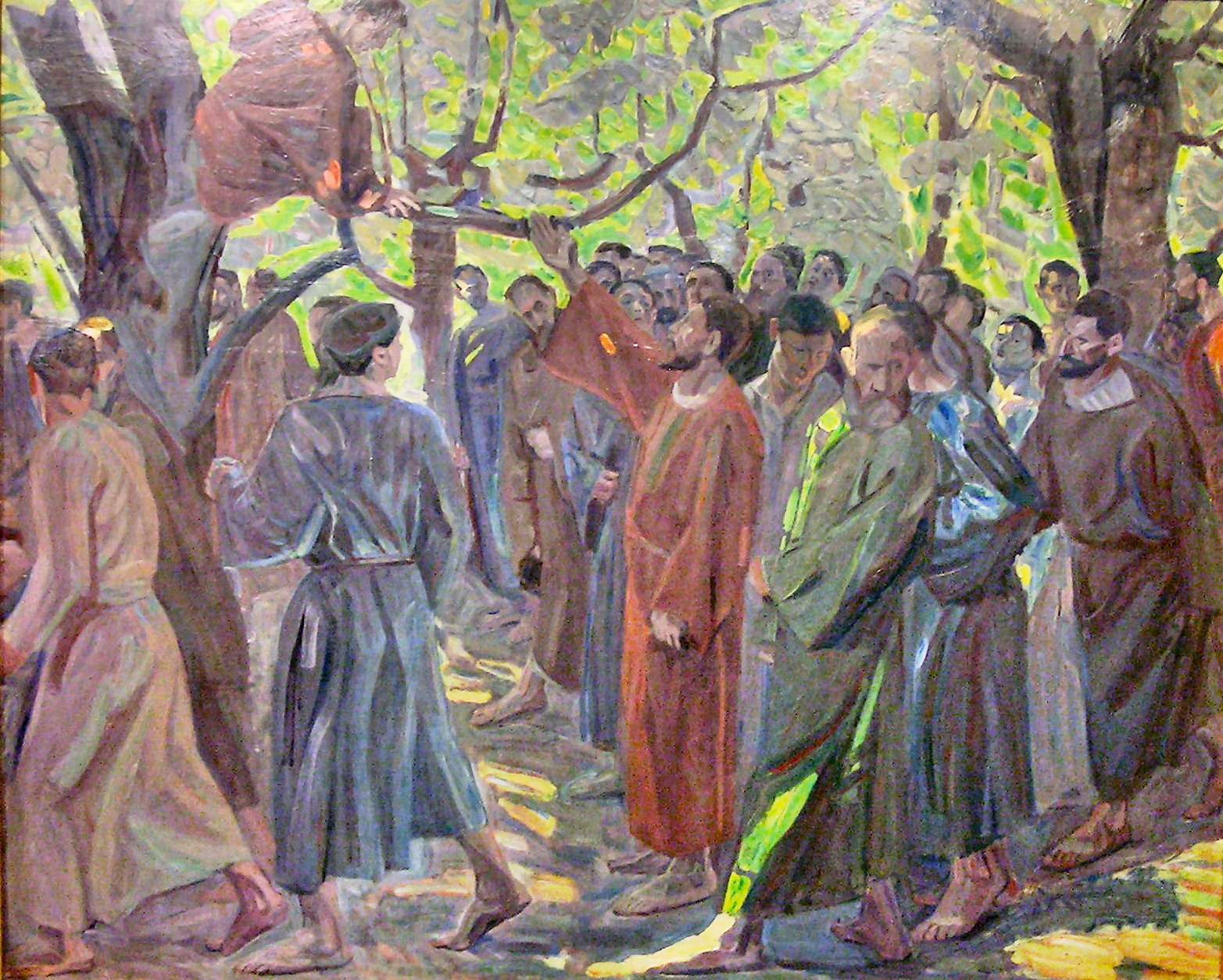 Niels Larsen Stevns: Zakæ (Christ And Zacchaeus)